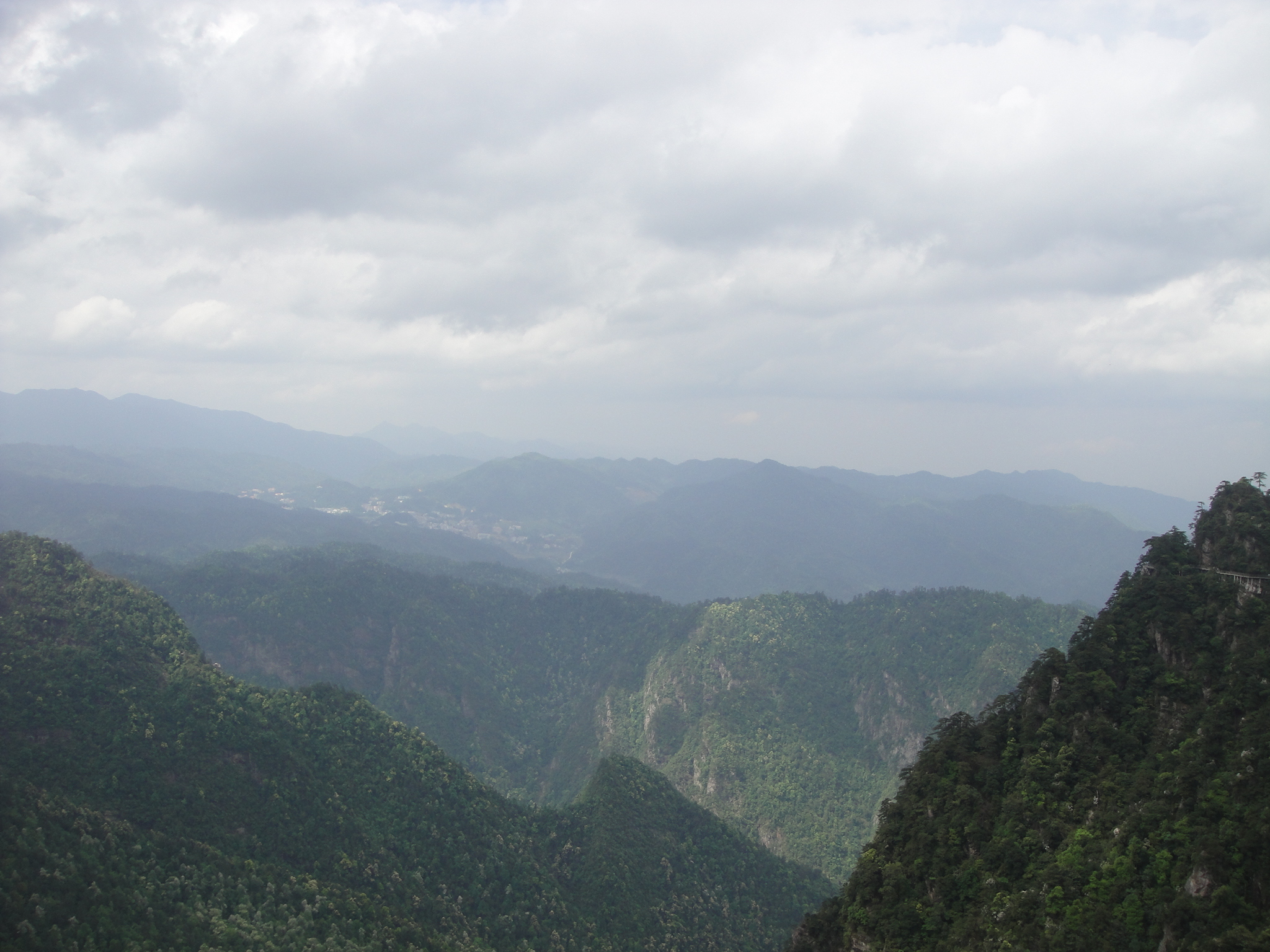 吴语: 井冈山 是湖湘搭江右个分界线